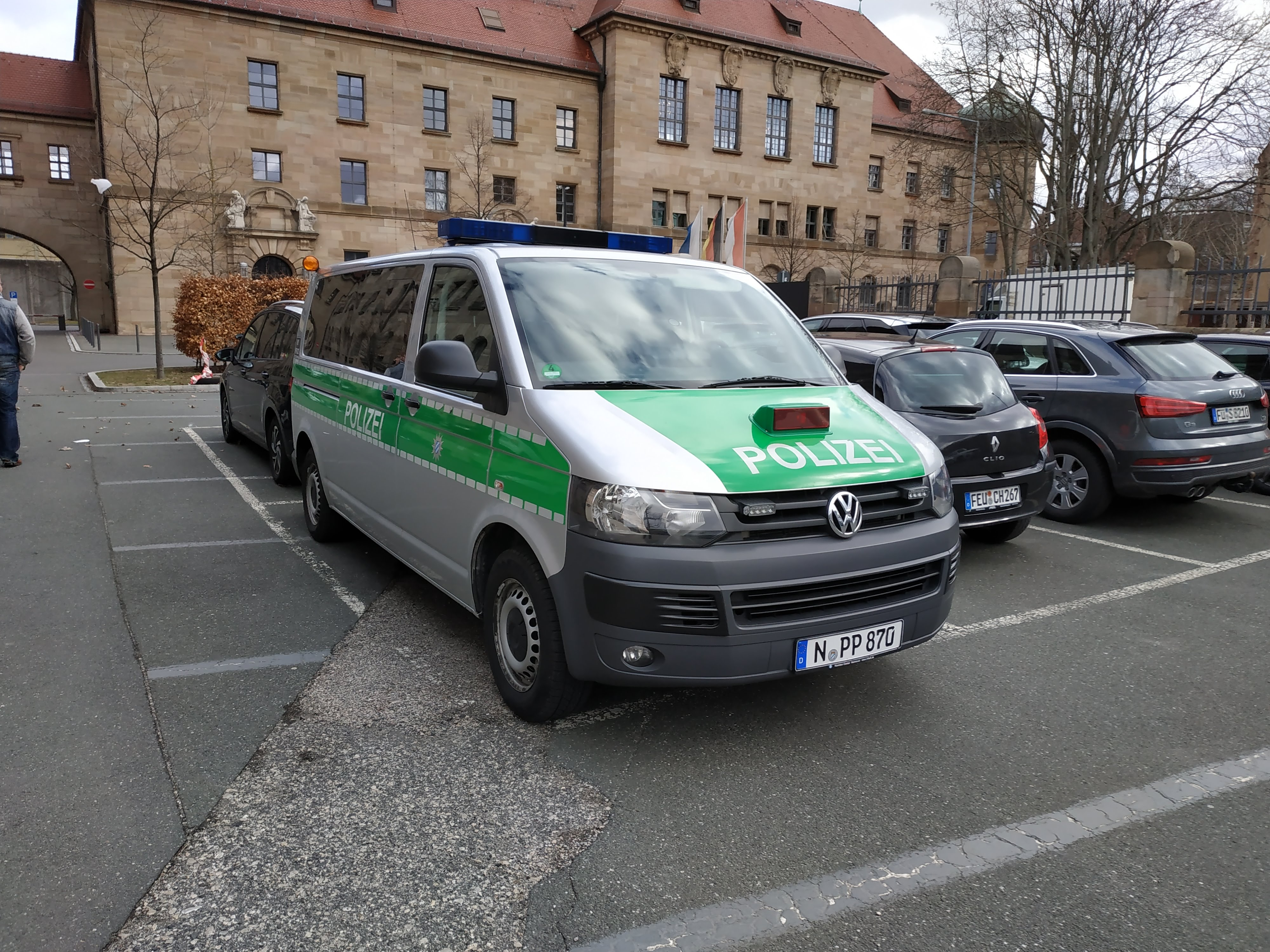 Véhicule de police Volkswagen T5 à Nuremberg